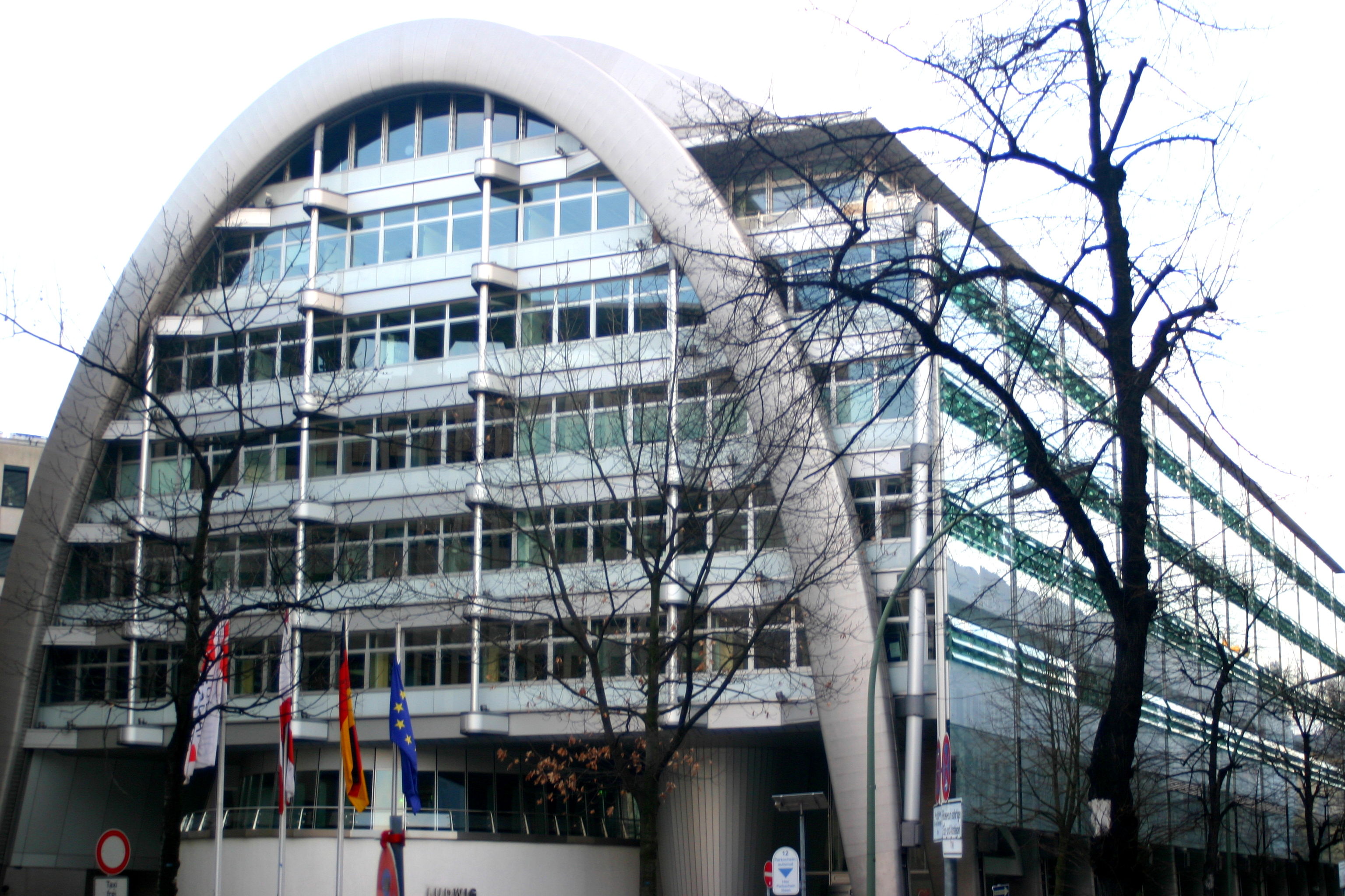 Ludwig Erhard Haus, Berlin, Fasanenstrasse, Architect: Nicholas Grimshaw